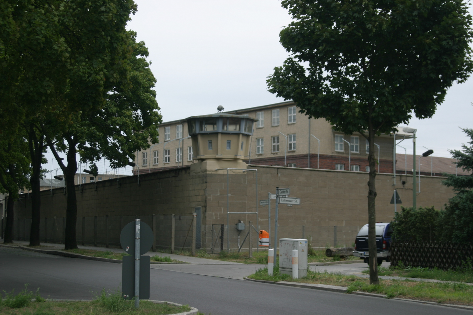 Stasi prison